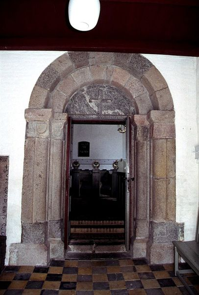 Højslev Kirke, sydportal